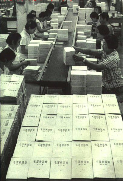 1966-08 1966年毛泽东选集